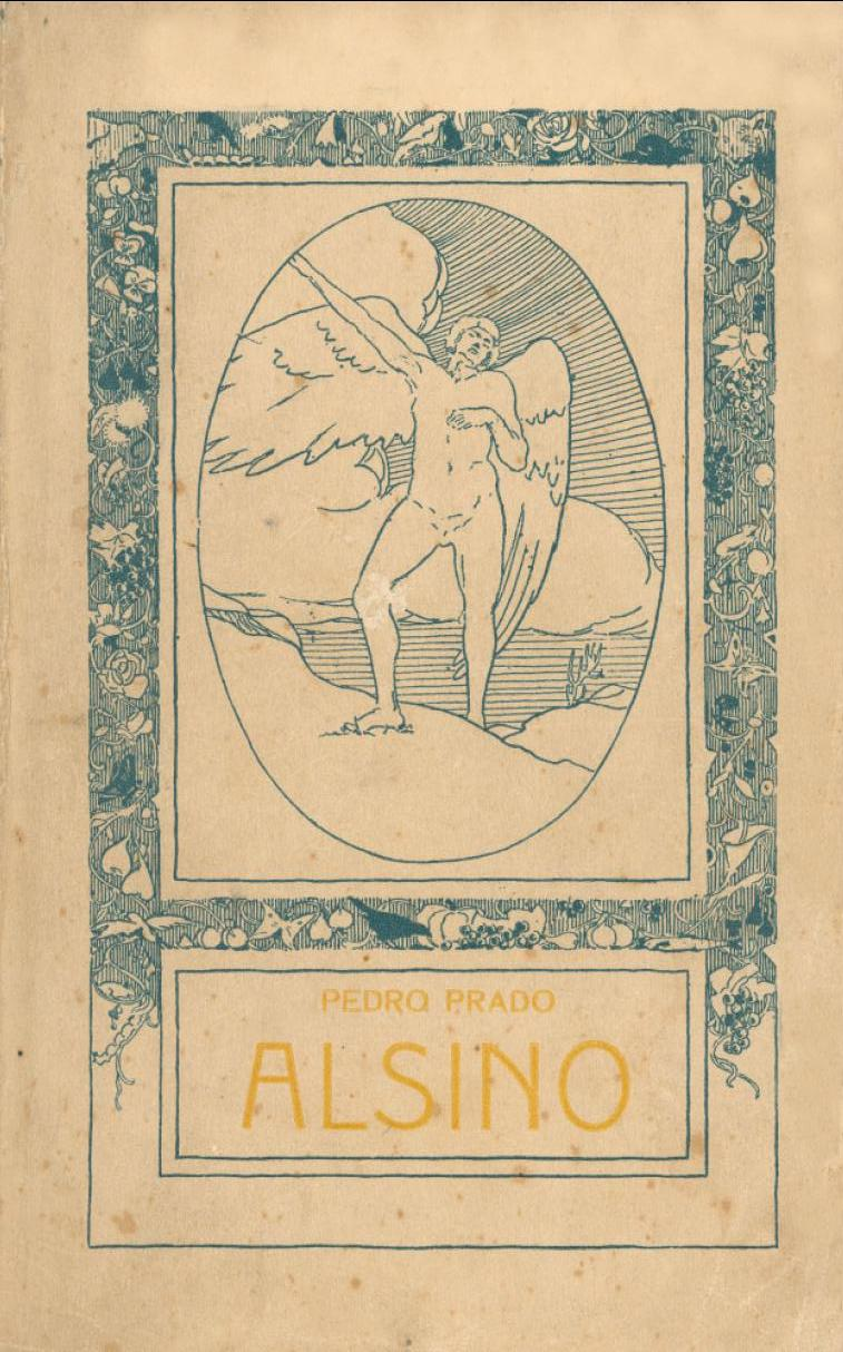 Portada de Alsino, una novela del escritor chileno Pedro Prado.